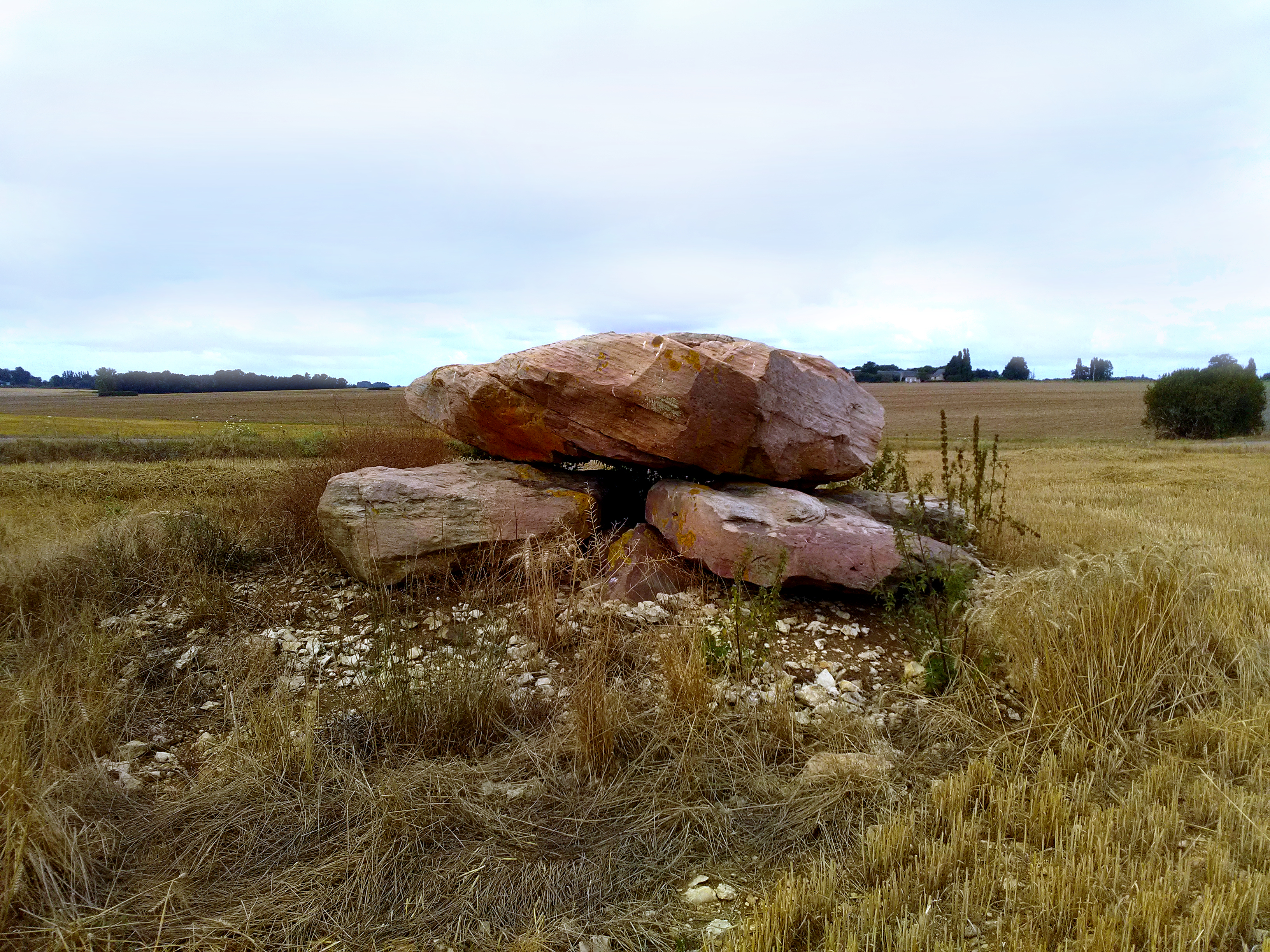 Dolmen de la Pierre-Folle à Luçay-le-Libre dans l'Indre